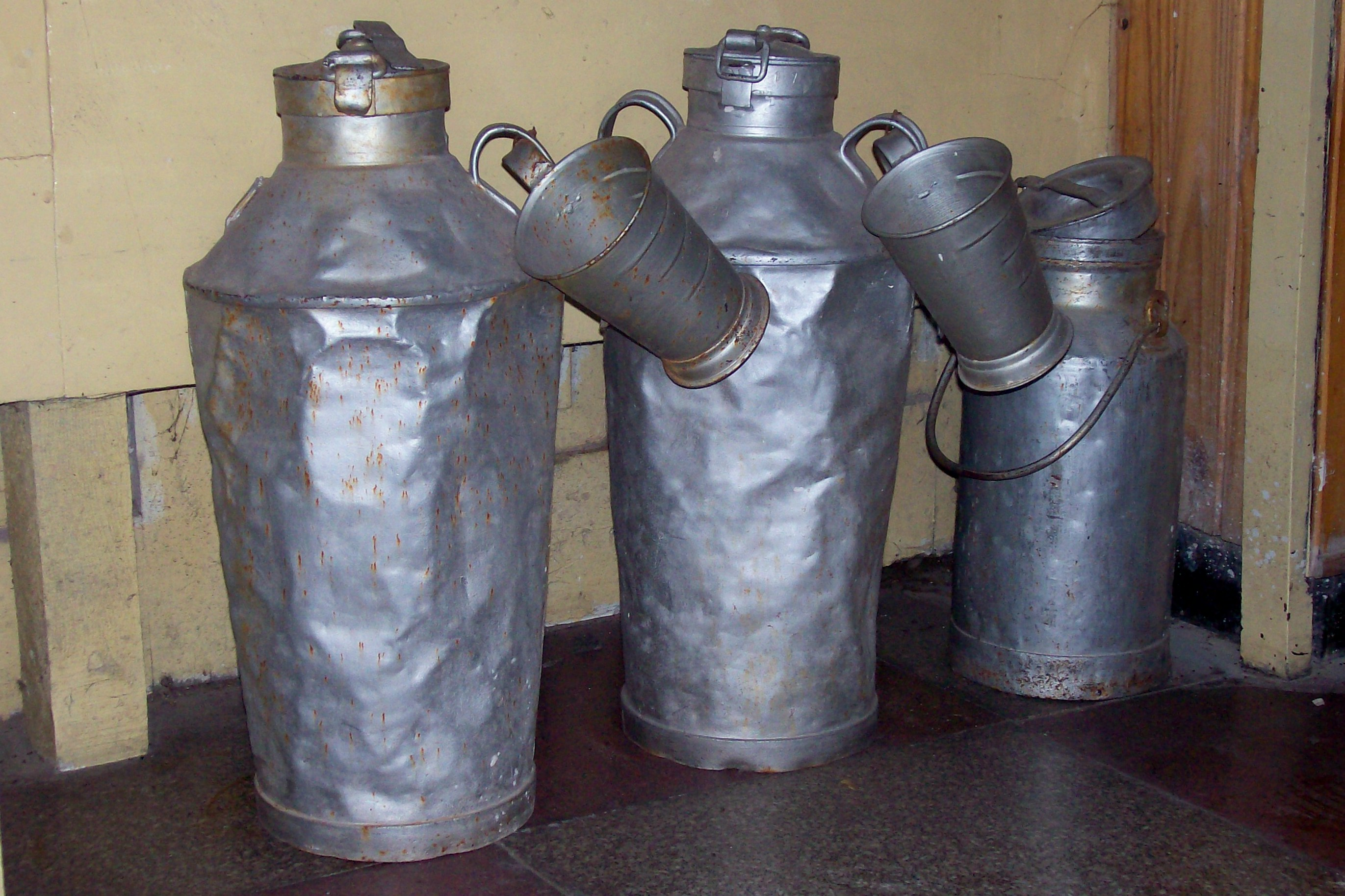 Típicos contenedores de leche utilizados en los tambos argentinos. Mataderos, Buenos Aires, Argentina.